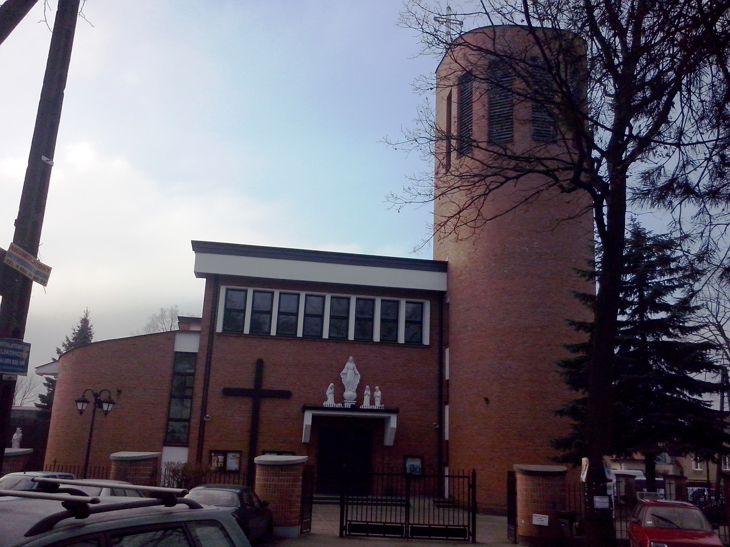 Halinów (pow. Mińsk Mazowiecki) - kościół Najświętszej Maryi Panny Matki Łaski Bożej